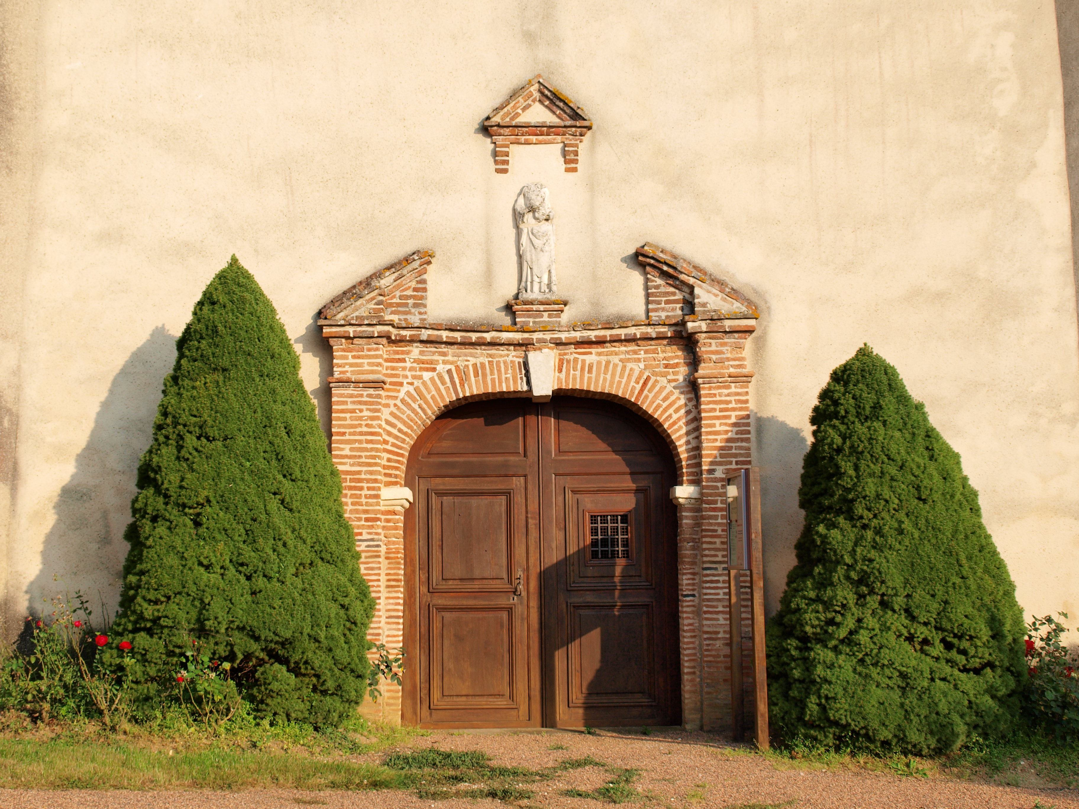 Saint-Denis-sur-Ouanne (Yonne, France) ; l'église